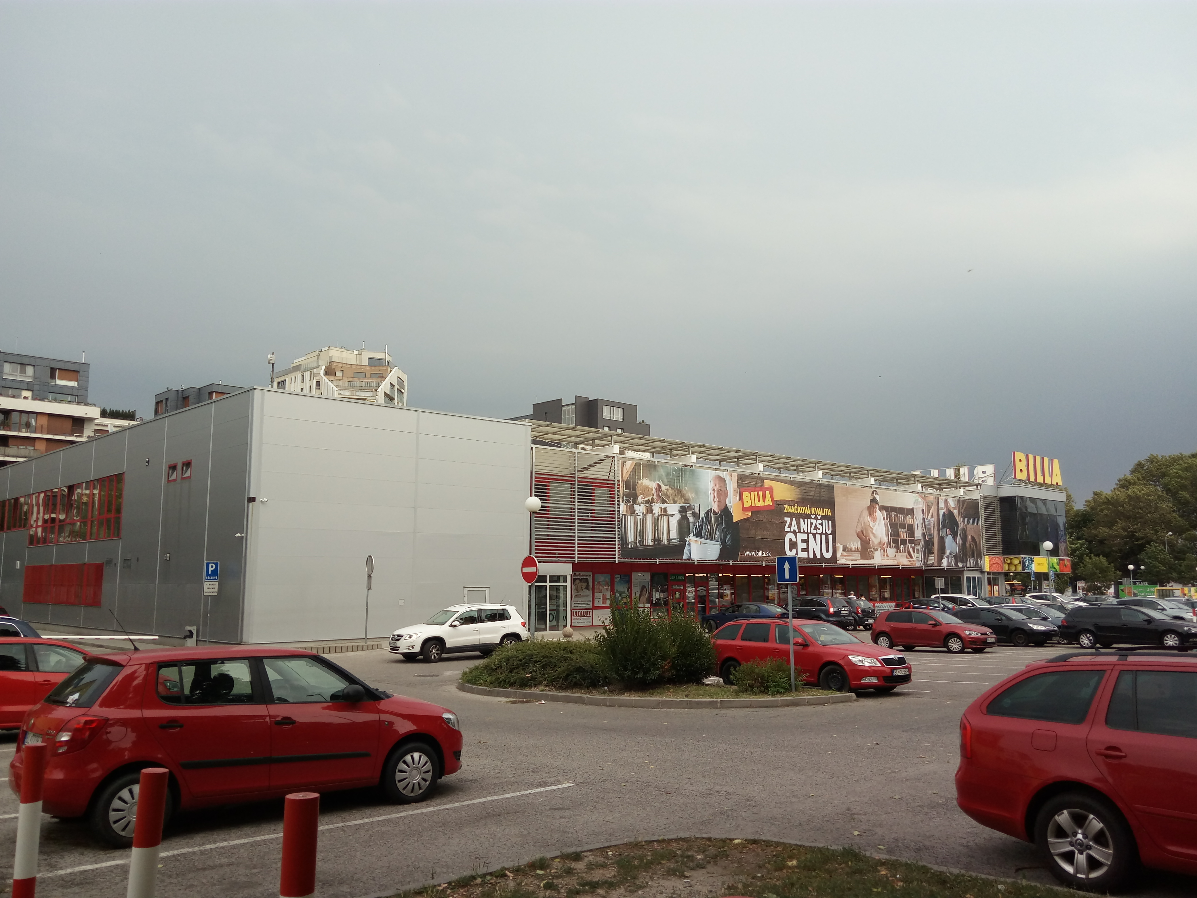 Billa, Bajkalská, Bratislava